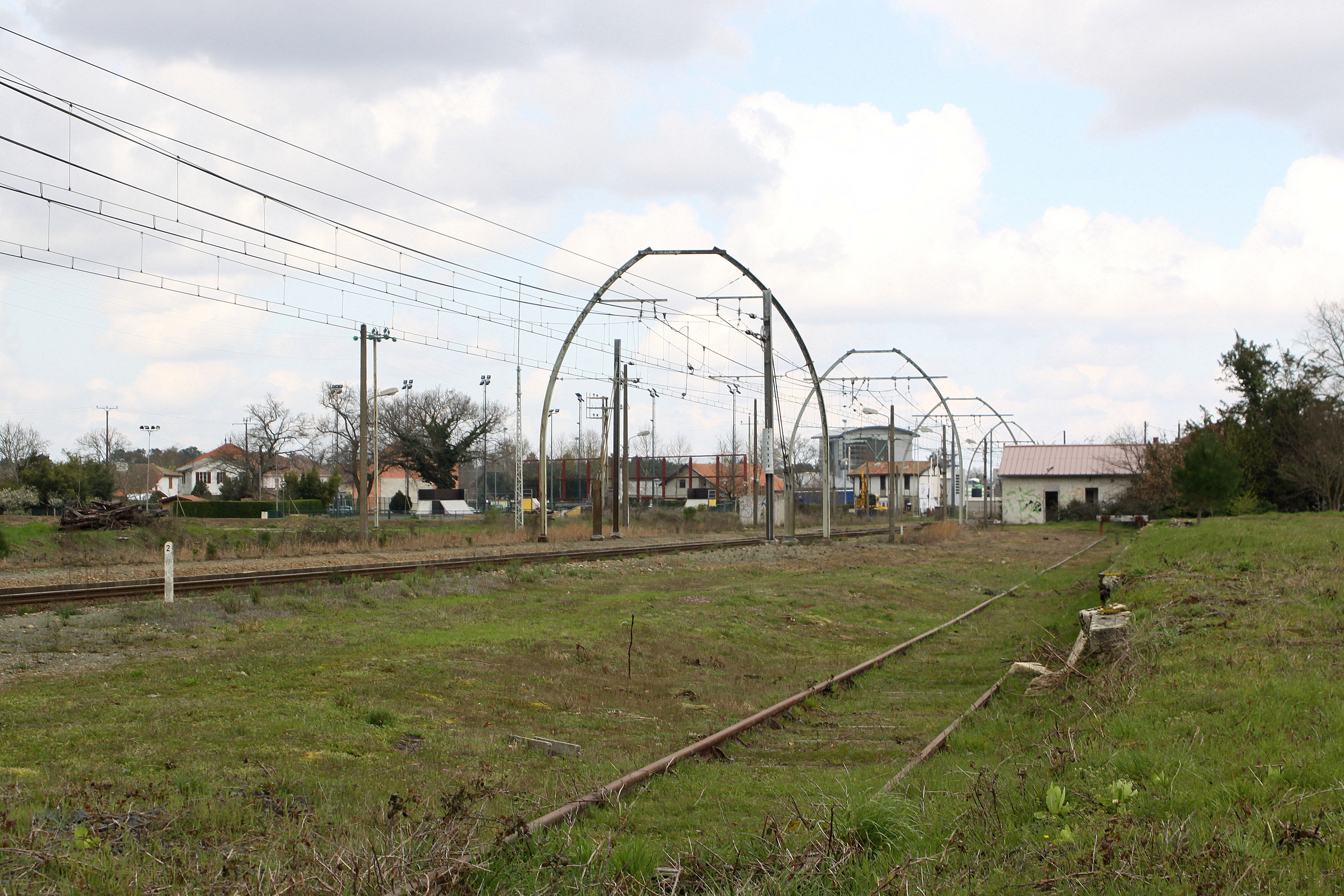 Vue op Gleiser